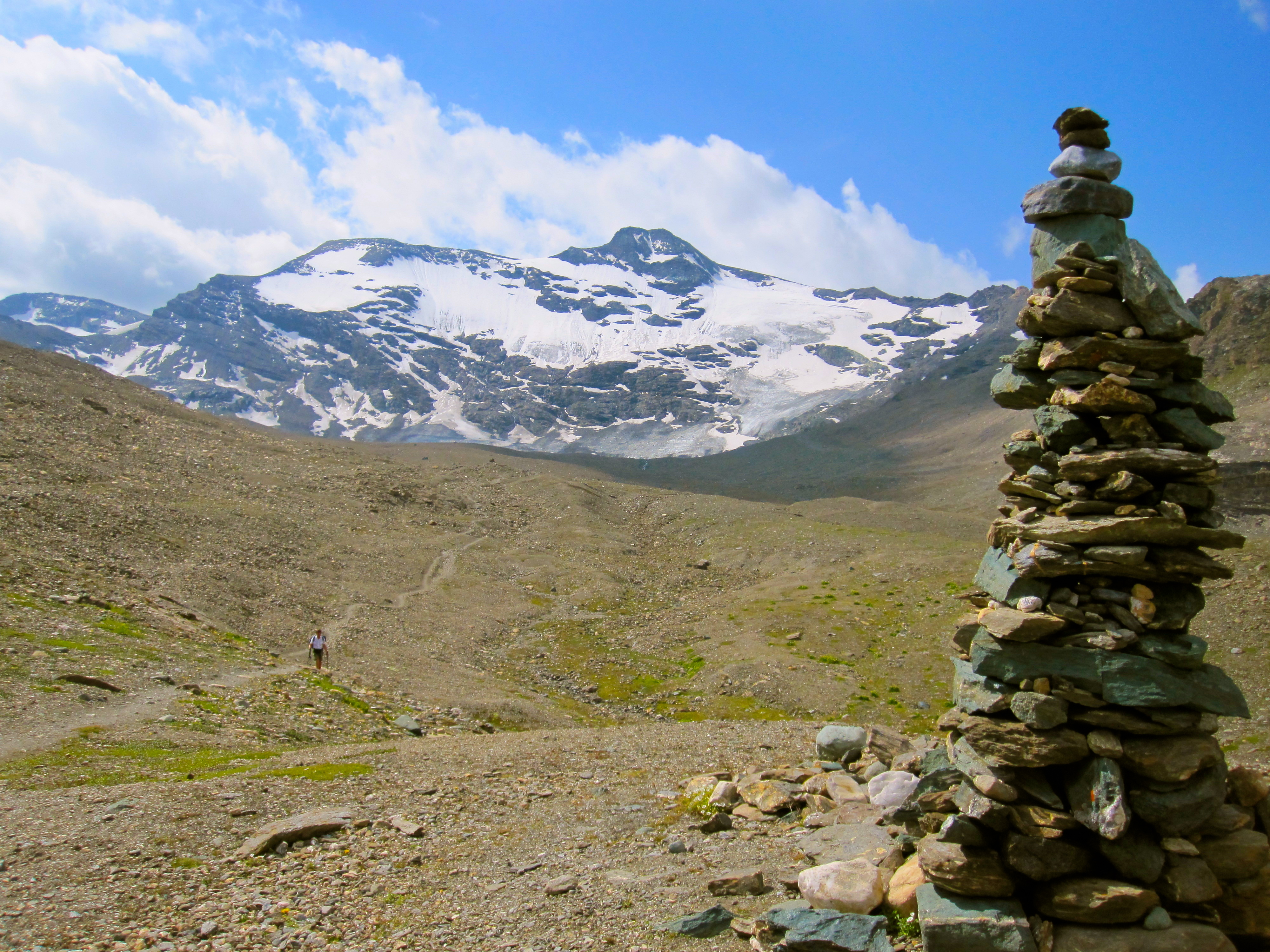 Cairn au premier plan sur son lit de pierres ocres. Au fond, Aiguille de Méan-Martin